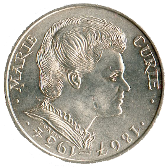 revers de la pièce de 100 francs 1984 (Marie Curie)